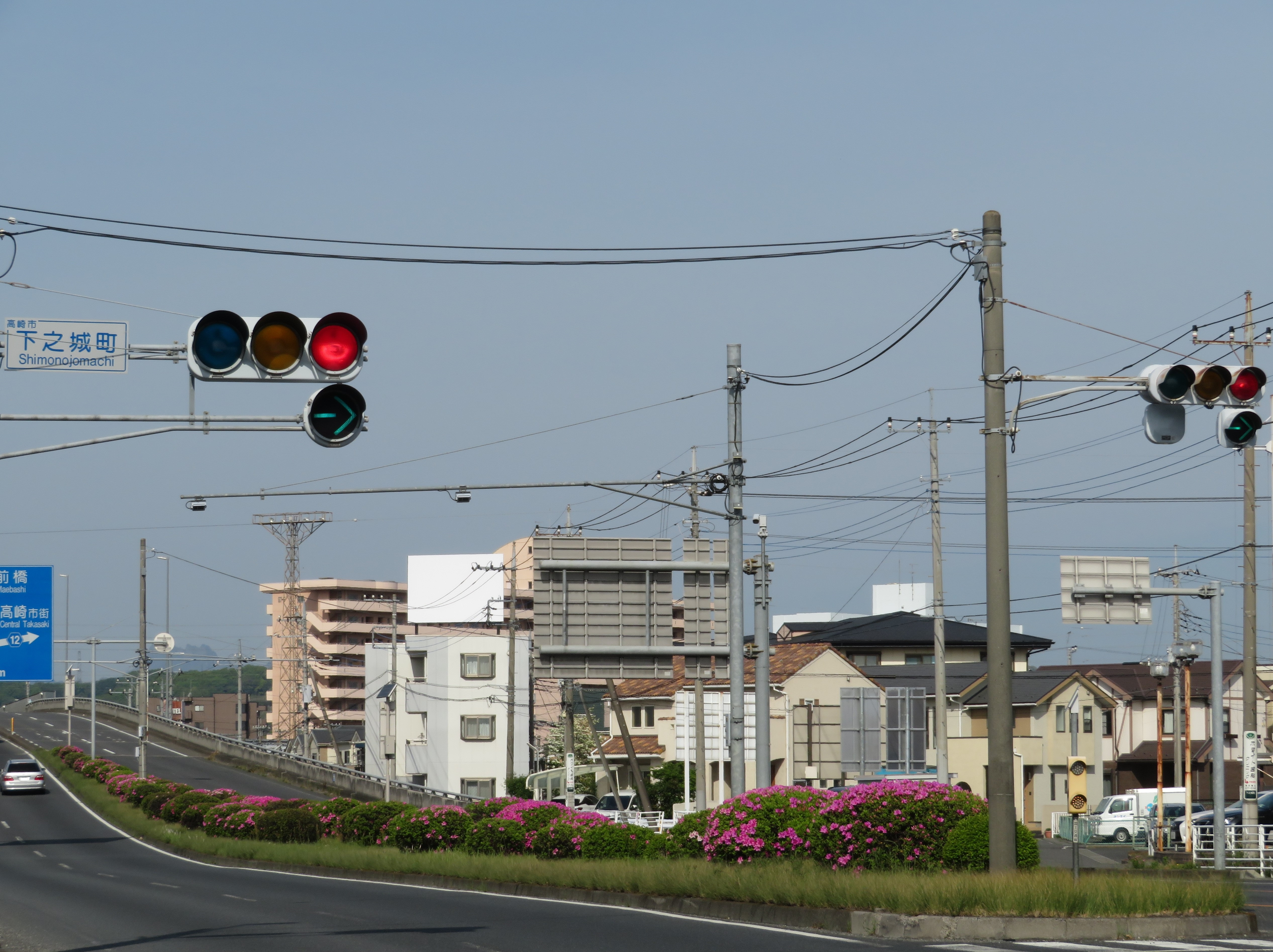 国道１７号線群馬県高崎市下之城町交差点に設置されている４５㎝信号灯器と３０㎝信号灯器 Canon PowerShot SX720 HS